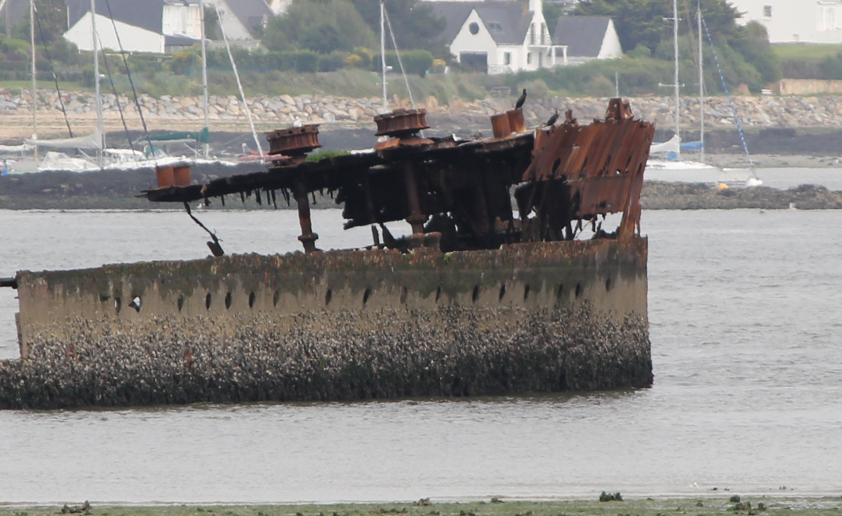 Proue de l'épave du SMS Regensburg/ Strasbourg dans la rade de Lorient à marée basse